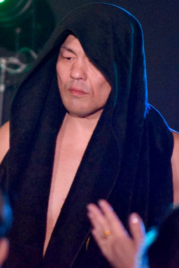 2017年3月12日 ベイコム総合体育館 「NEW JAPAN CUP 2017」 鈴木みのる